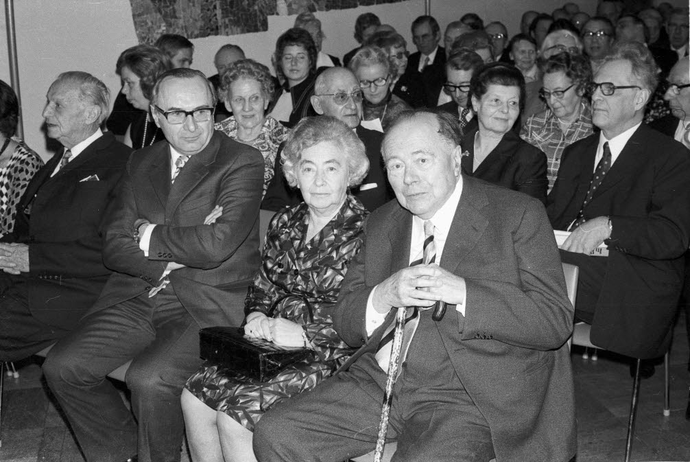 Der Jubilar wird mit einer Feierstunde in seinem ehemaligen Institut geehrt. In der ersten Reihe v.r. Prof. Baade, seine Ehefrau Edith, der amtierende Leiter des Instituts für Weltwirtschaft, Prof. Herbert Giersch, und der ehemalige Erste Bürgermeister von Hamburg, Herbert Weichmann.